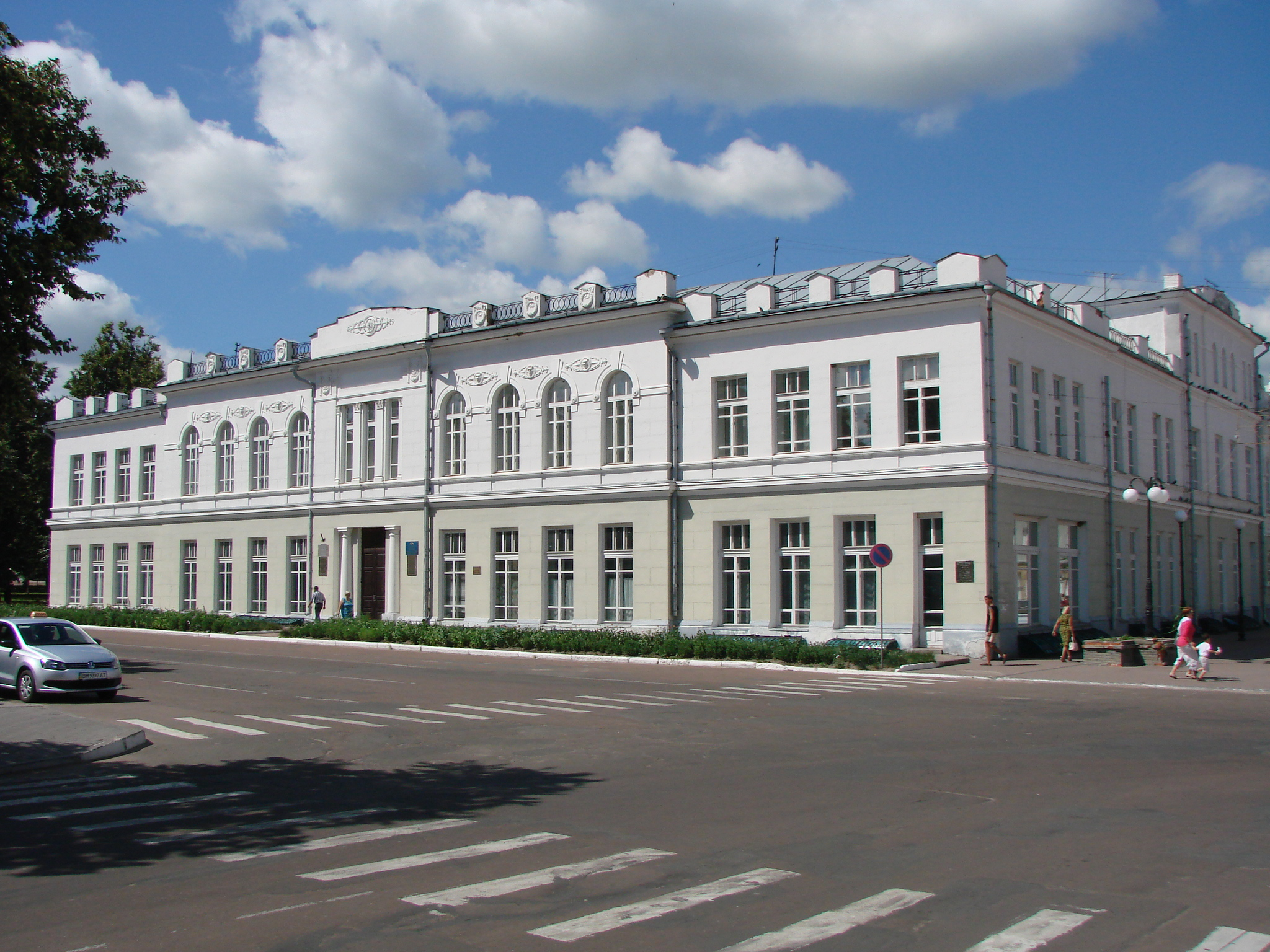 Будинок повітової земської управи і міської управи, Глухів, вул. Києво-Московська, 51 (Радянська, 45)